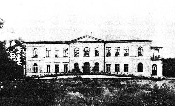 Беларуская (тарашкевіца): Лучай (Łučaj), палац Агінскіх (Aginski)